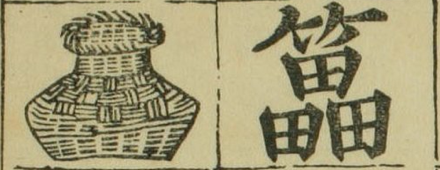 粵語: 䉪。取自對大明時相四言雜字。出版洪武辛亥孟秋吉日。金陵王氏勤有書堂。